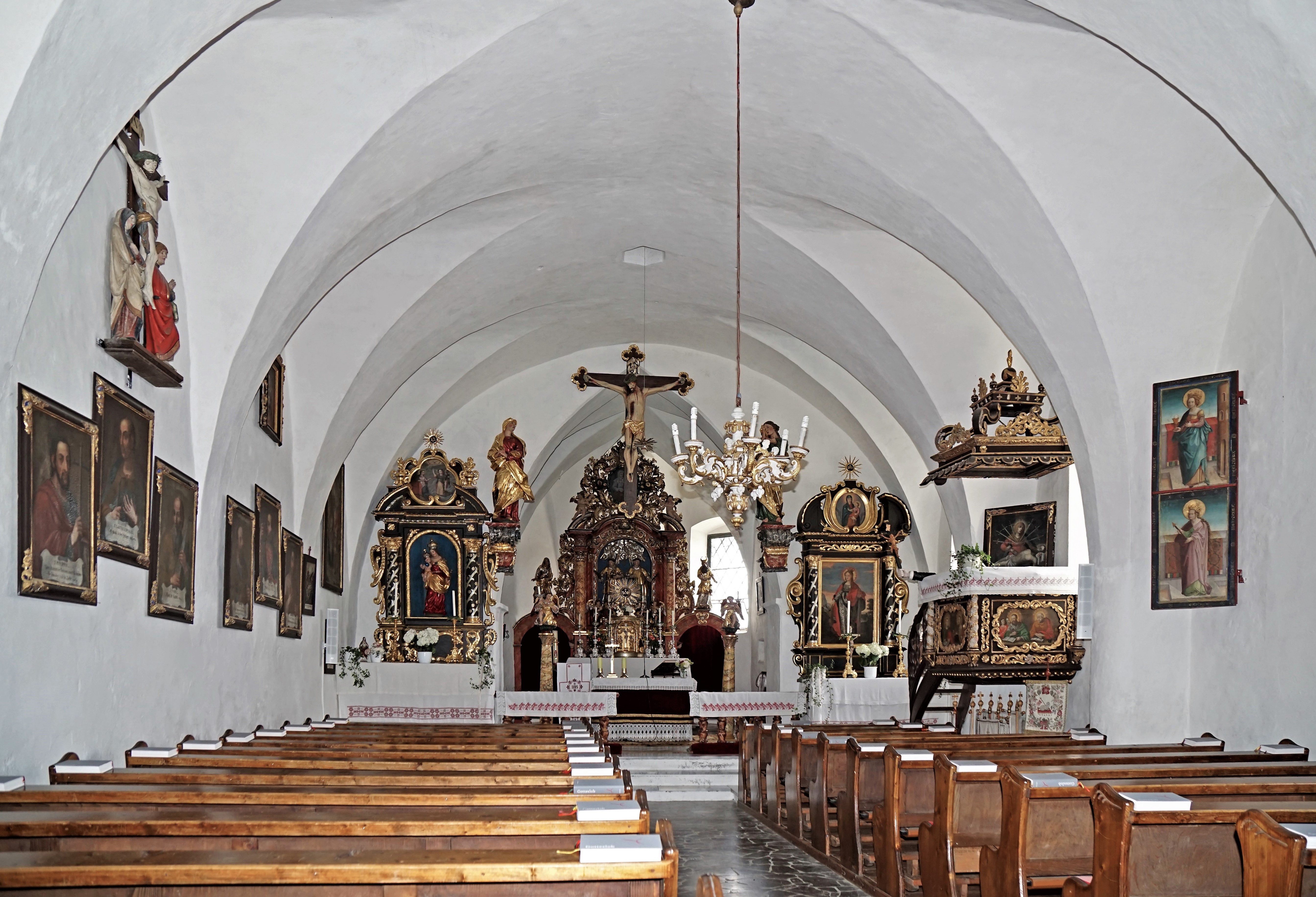 Kath. Pfarrkirche St.Lorenzen (Ebene Reichenau), Innenansichtf